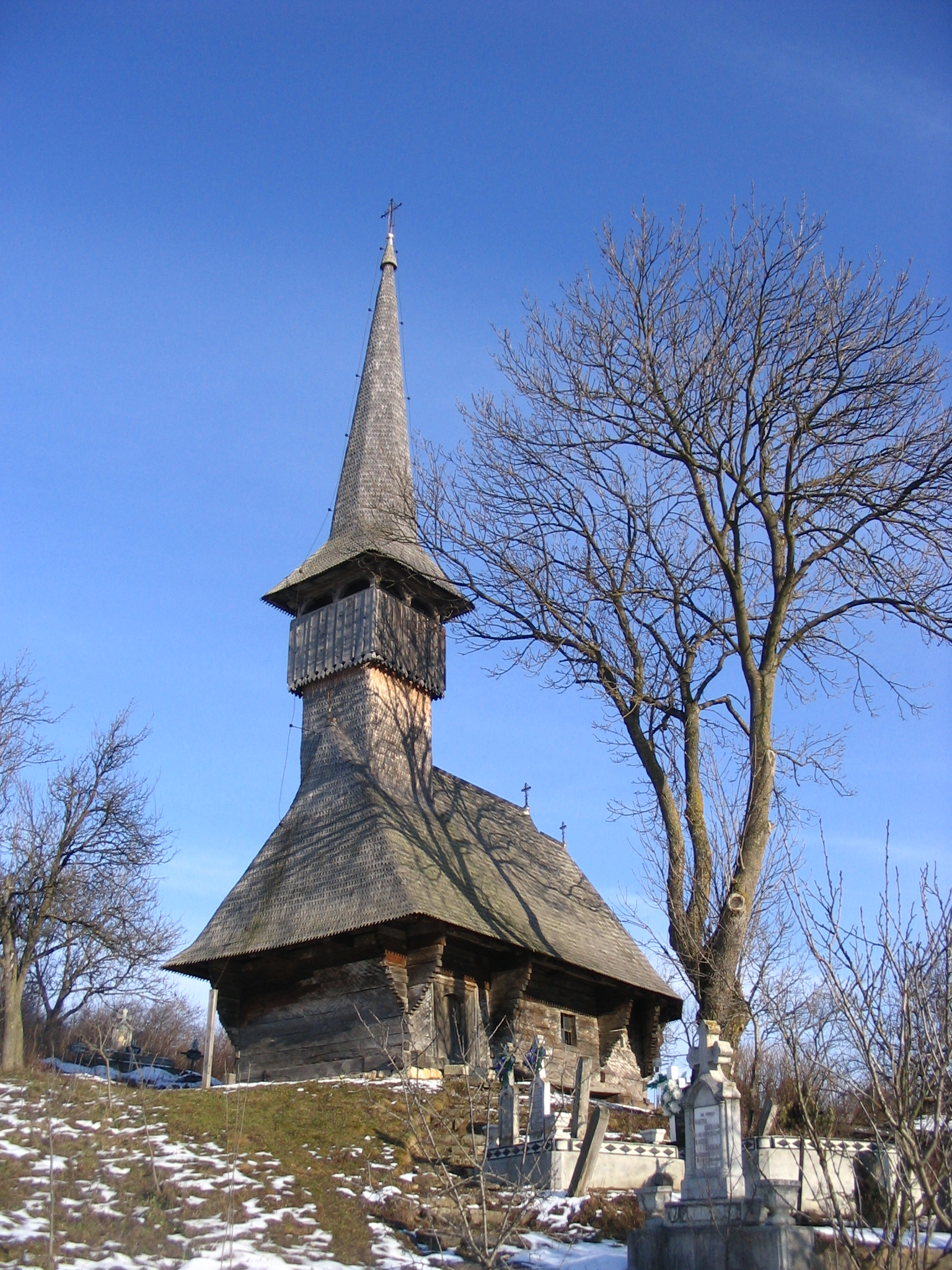 Biserica de lemn din Poarta Sălajului, Sălaj. Autor: Bogdan Ilieş Data: ianuarie 2006